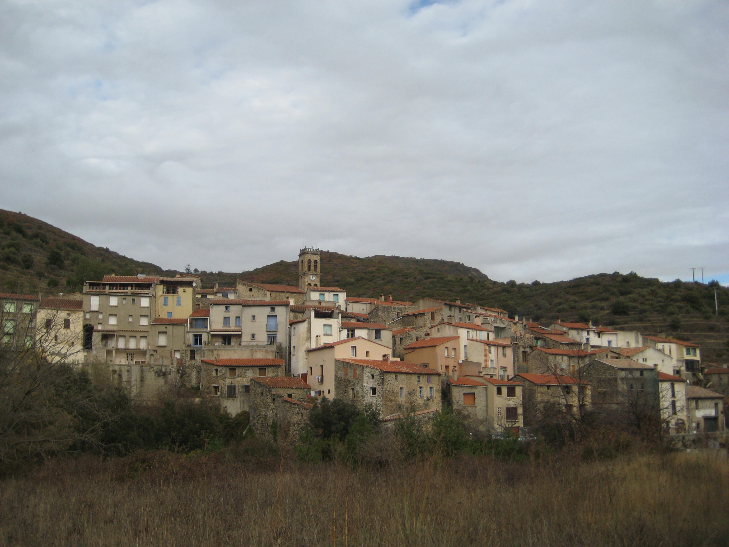 Pesillà de Conflent.